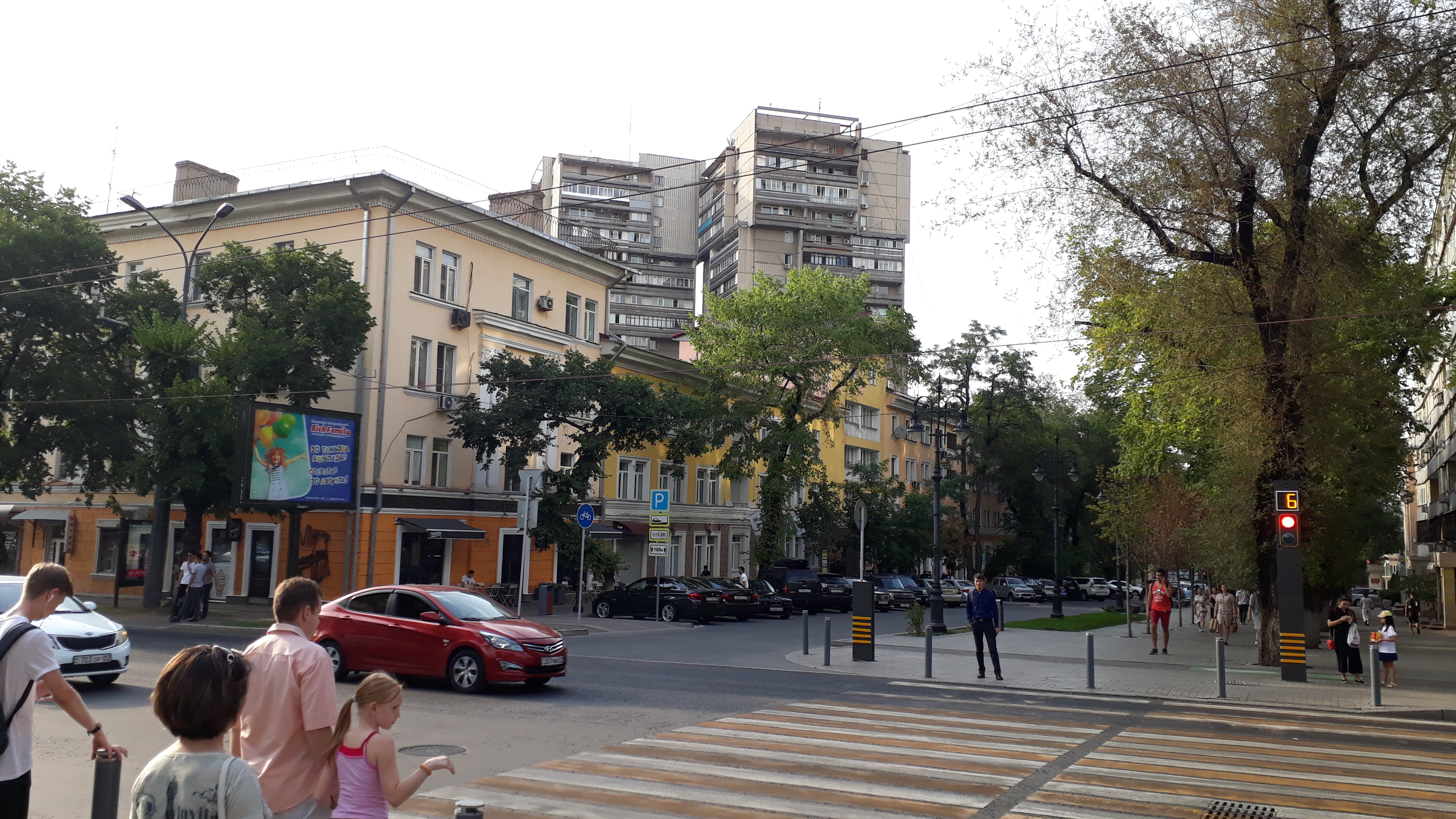 Высотки на Жибек Жолы придают динамичность этой доминанте алматинского Арбата. Галерея Тенгри-Умай расположена в западной башне.